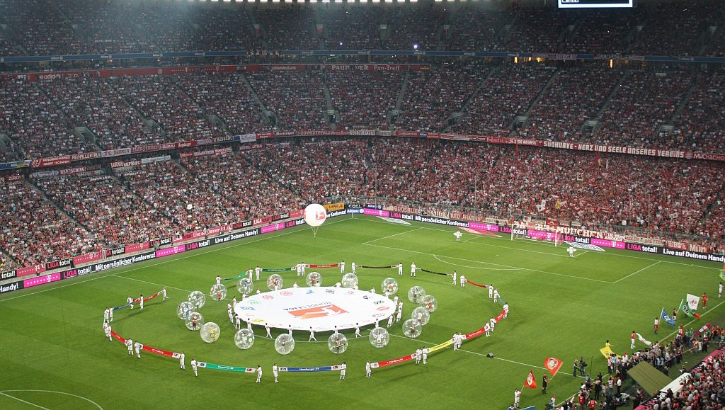 FC Bayern München - VfL Wolfsburg (2:1) 20.08.2010 (Das Photo wurde von Mdiet bearbeitet) Erföffungsfeier zur Saisoneröffnung 2010/2011